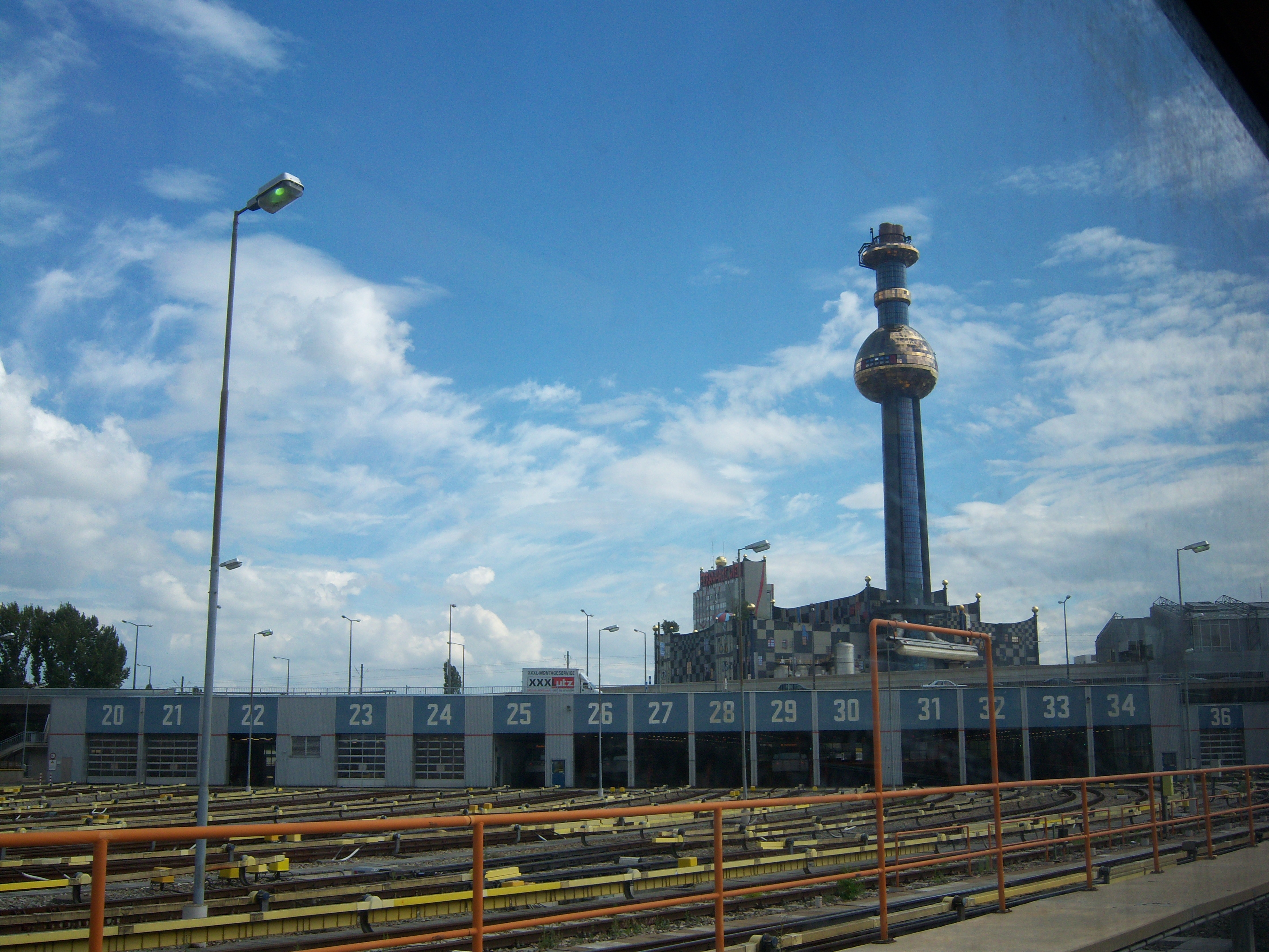 Betriebsbahnhof Wasserleitungswiese der Wiener U-Bahn (U1, U4)